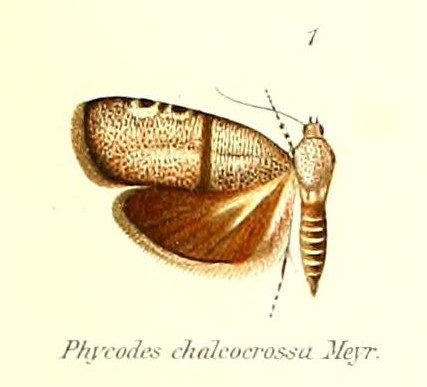 Phycodes chalcocrossa